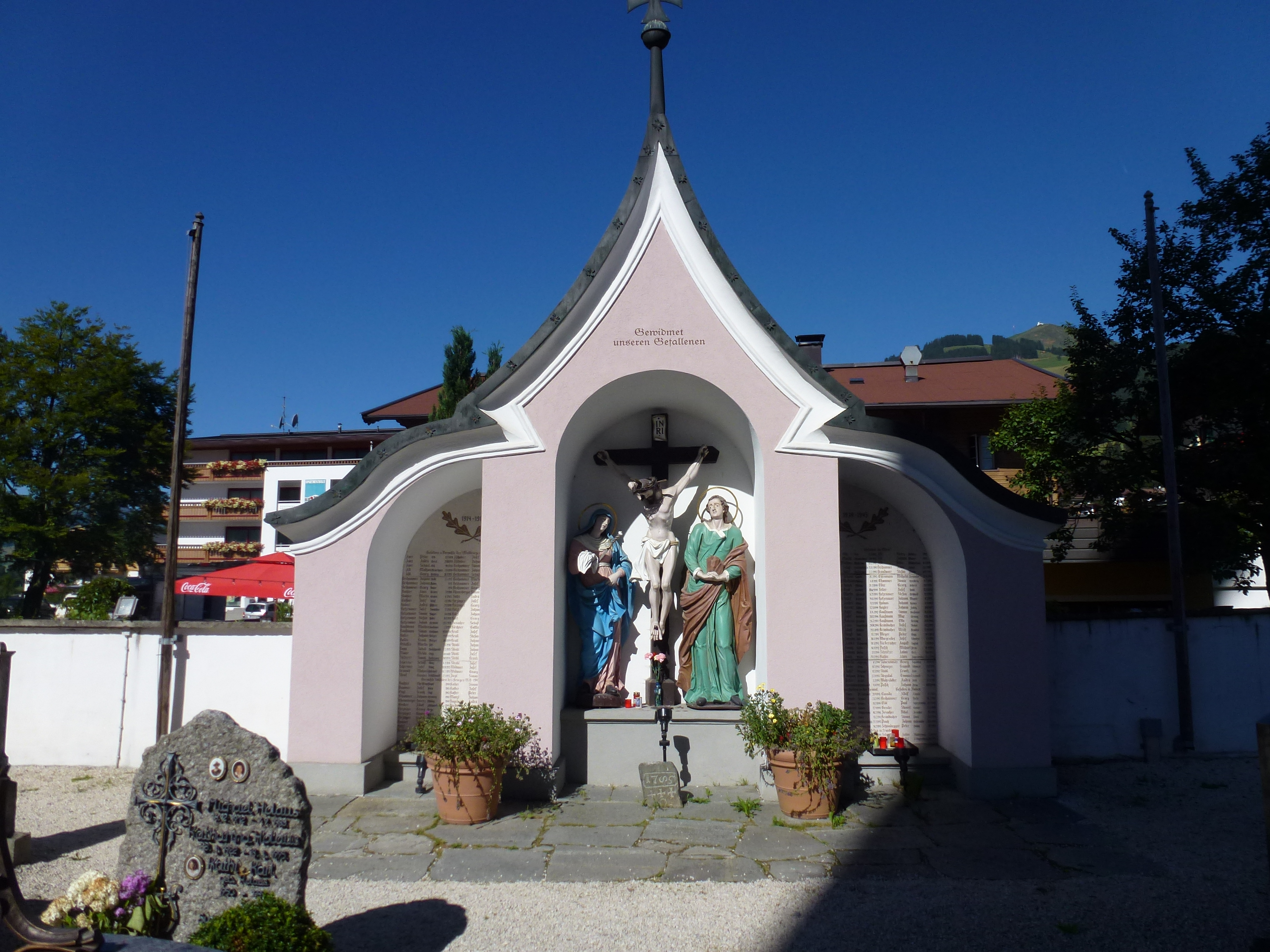 Bildstock, Kriegerdenkmal - Dorfstraße, Brixen im Thale This media shows the remarkable cultural object in the Austrian state of Tyrol listed by the Tyrolean Art Cadastre with the ID 4617. (on tirisMaps, pdf, more images on Commons, Wikidata)